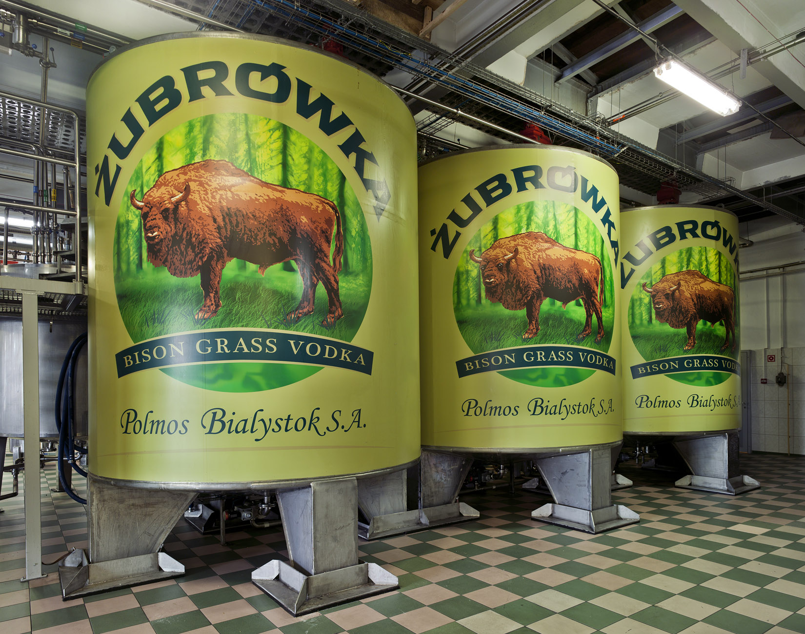 Miejsce produkcji wódki Żubrówka